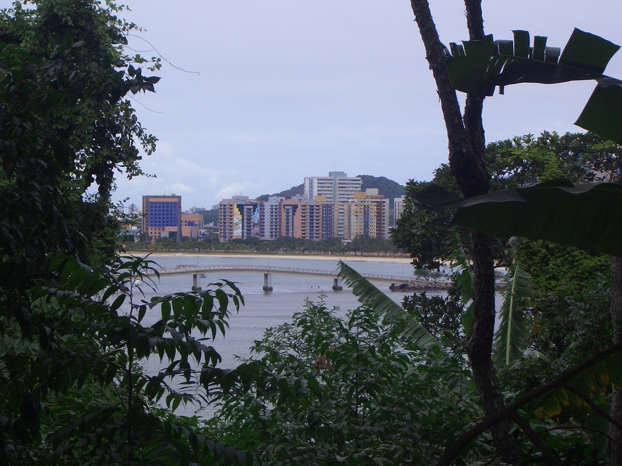 Praia do Canto e Enseda do Suá Author: Junior Pedruzzi Date: 26/07/2006 Time: Almost 8AM